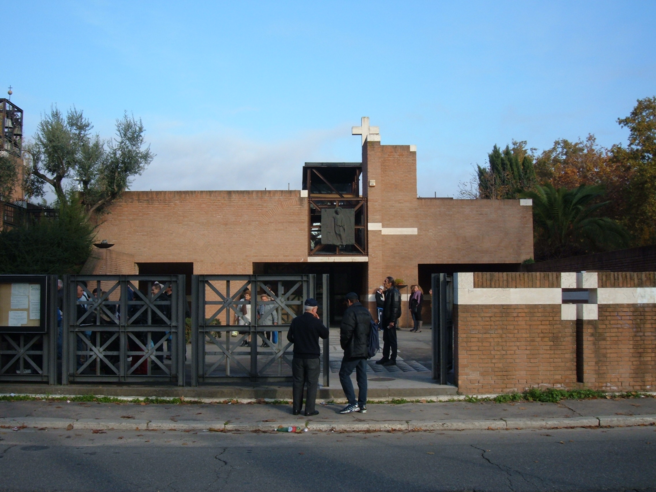 Chiesa di San Valentino, a Roma, nel quartiere Parioli (Villaggio Olimpico).